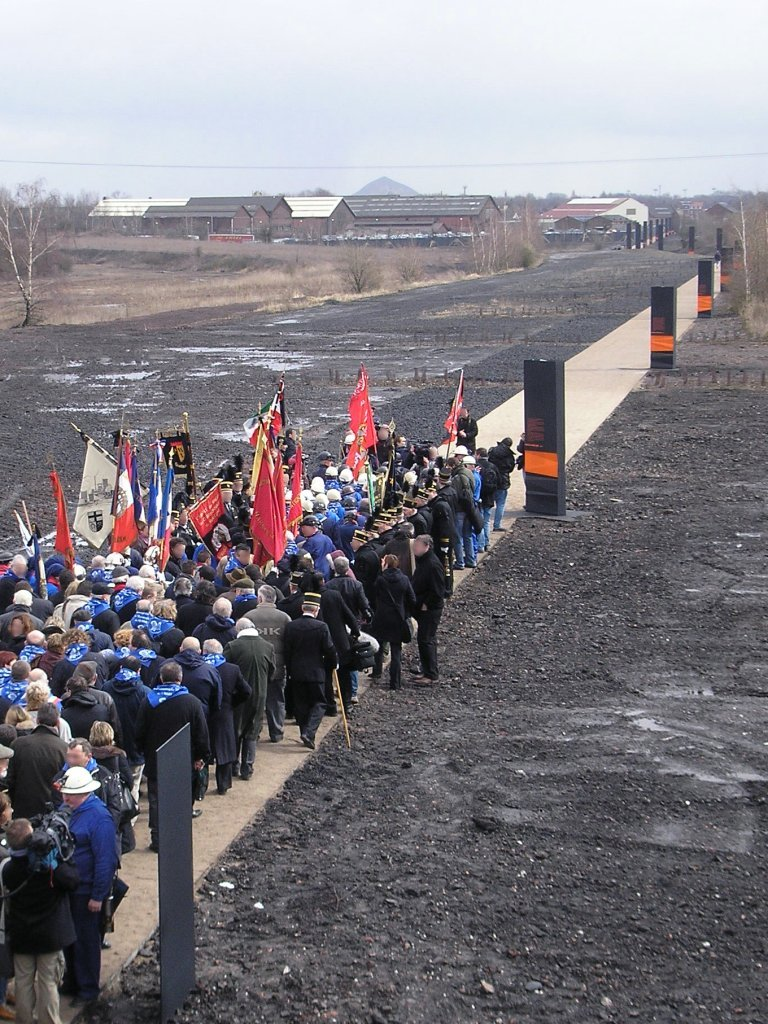 « Parcours des rescapés » symbolisant le cheminement des rescapés de la catastrophe du 10 mars 1906 jusqu'au puits de la fosse 2 de Billy-Montigny. Photo prise par moi-même lors de l'inauguration le 10 mars 2006.